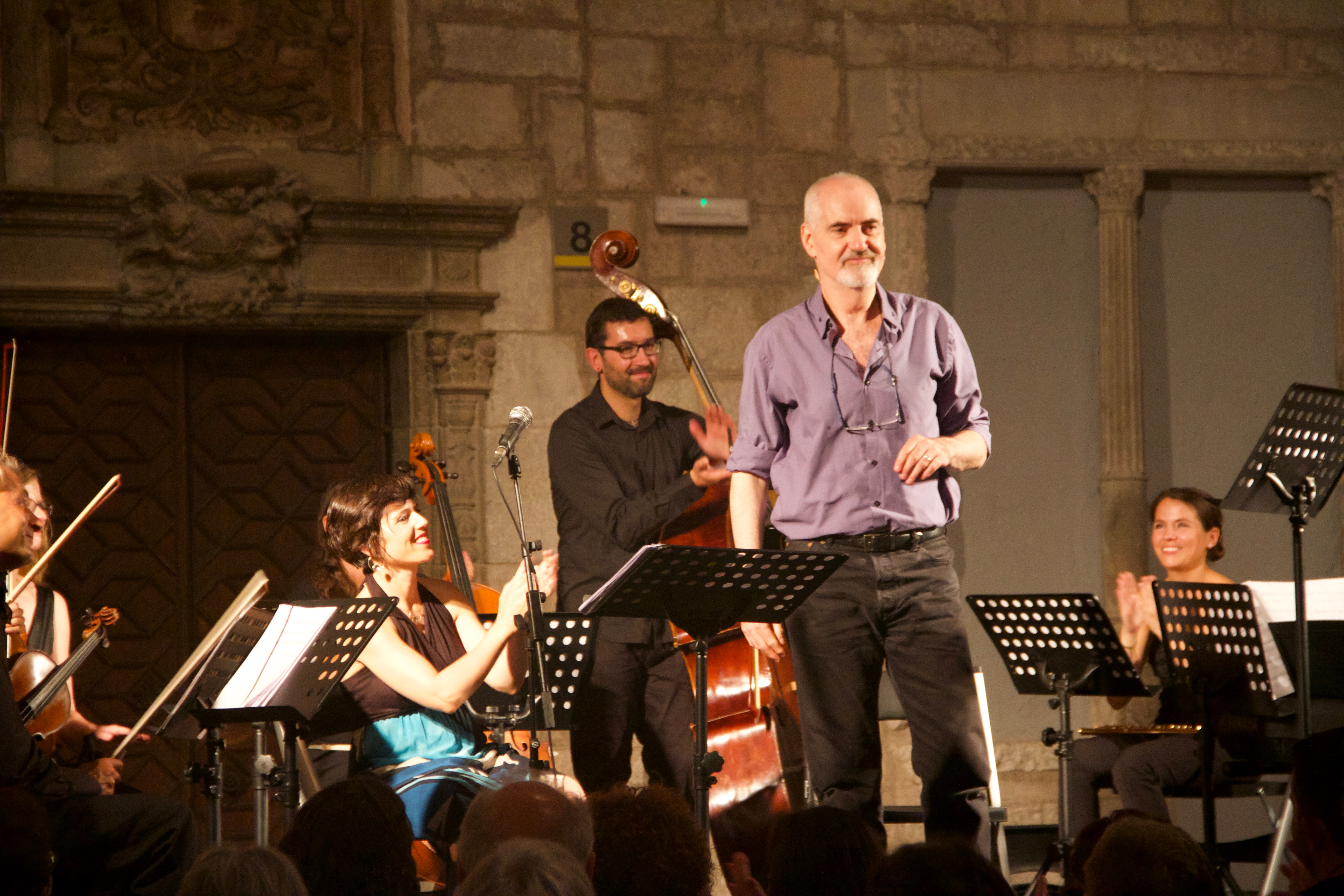 JOSAFAT TORNA A CASA